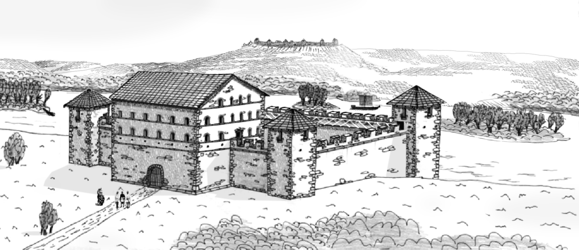 Rekonstruktionsversuch des Burgus contra Florentiam, Dunafalva, Ungarn.